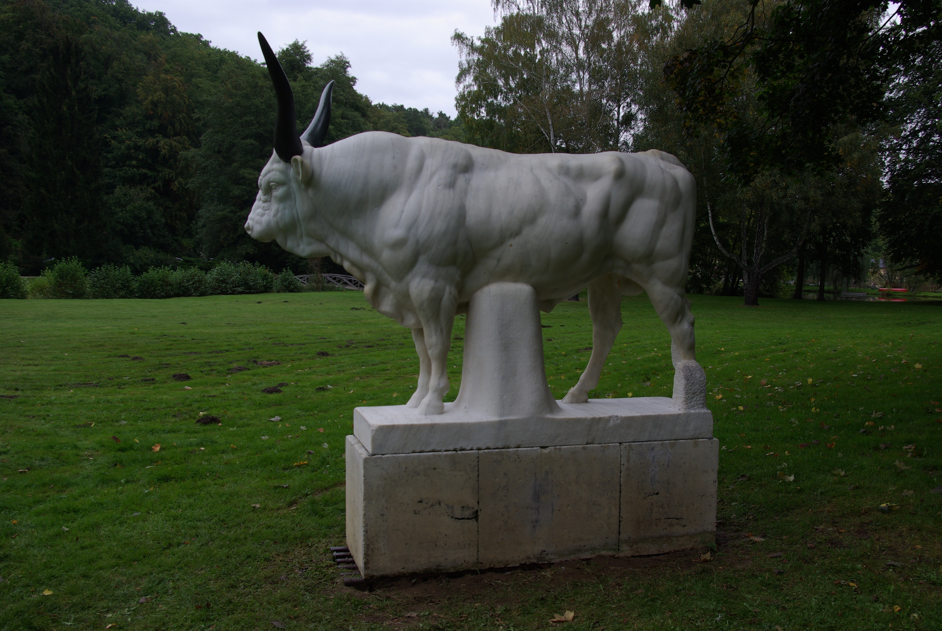 Bad Freienwalde in Brandenburg. Die Skulptur "Stier" im Kurpark wurde Anfang des 20. Jahrhunderts von Louis Tuaillon erstellt, aber nicht vollendet.